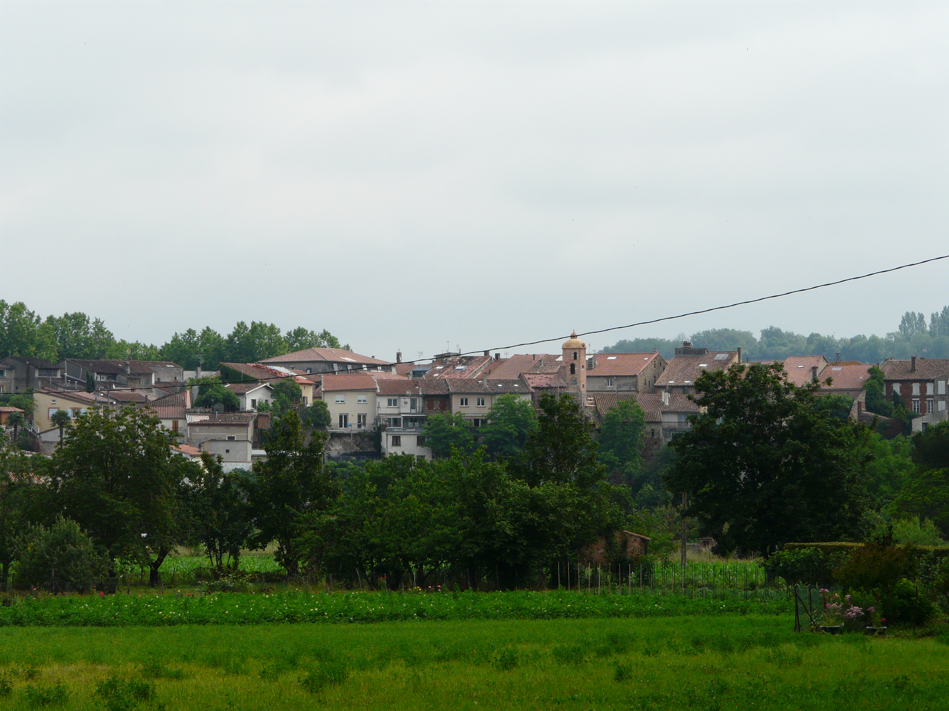 La ville de Carbonne vue depuis l'avenue Frédéric Mistral, au sud-ouest, Haute-Garonne, France.